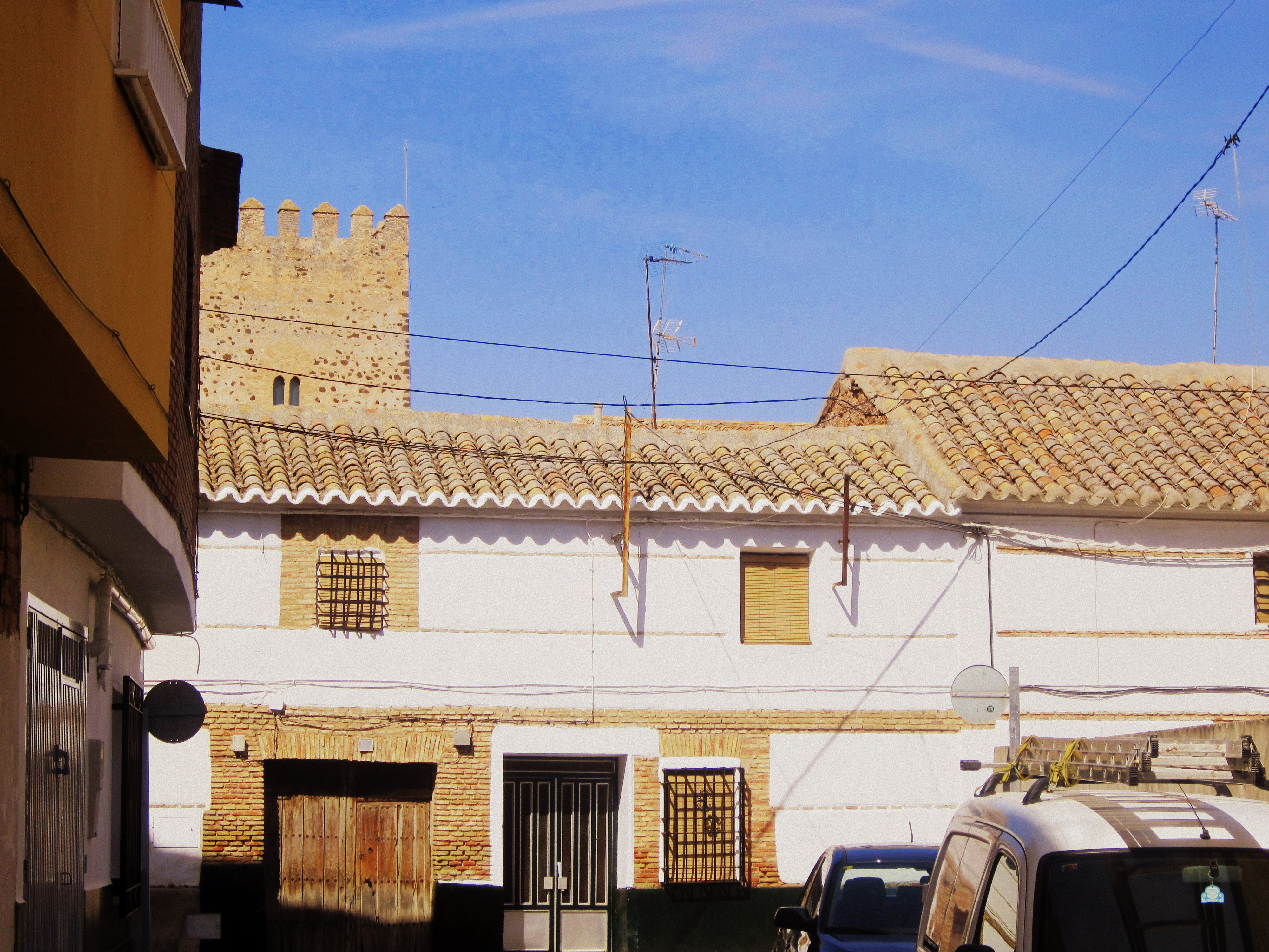 Foto tomada desde la calle del Arzobispo Calzado.